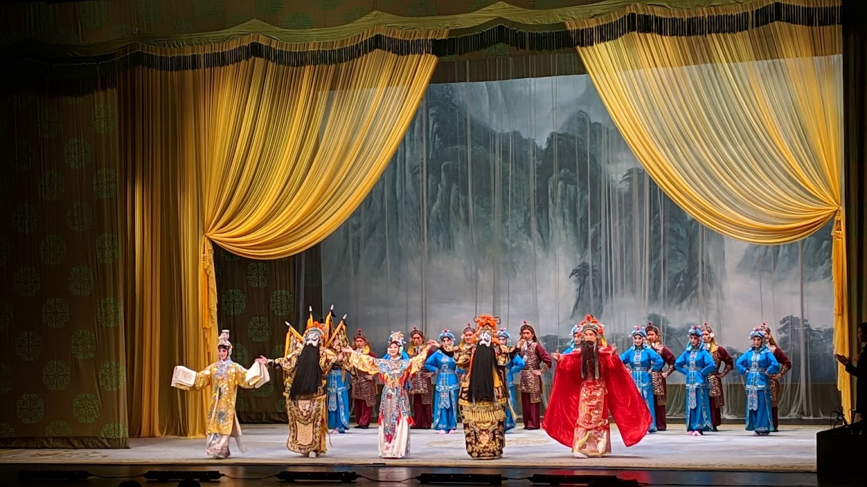 中文（台灣）: 中國國家京劇院在台北市國家戲劇院演出全本《霸王別姬》，謝幕開放觀眾拍照。